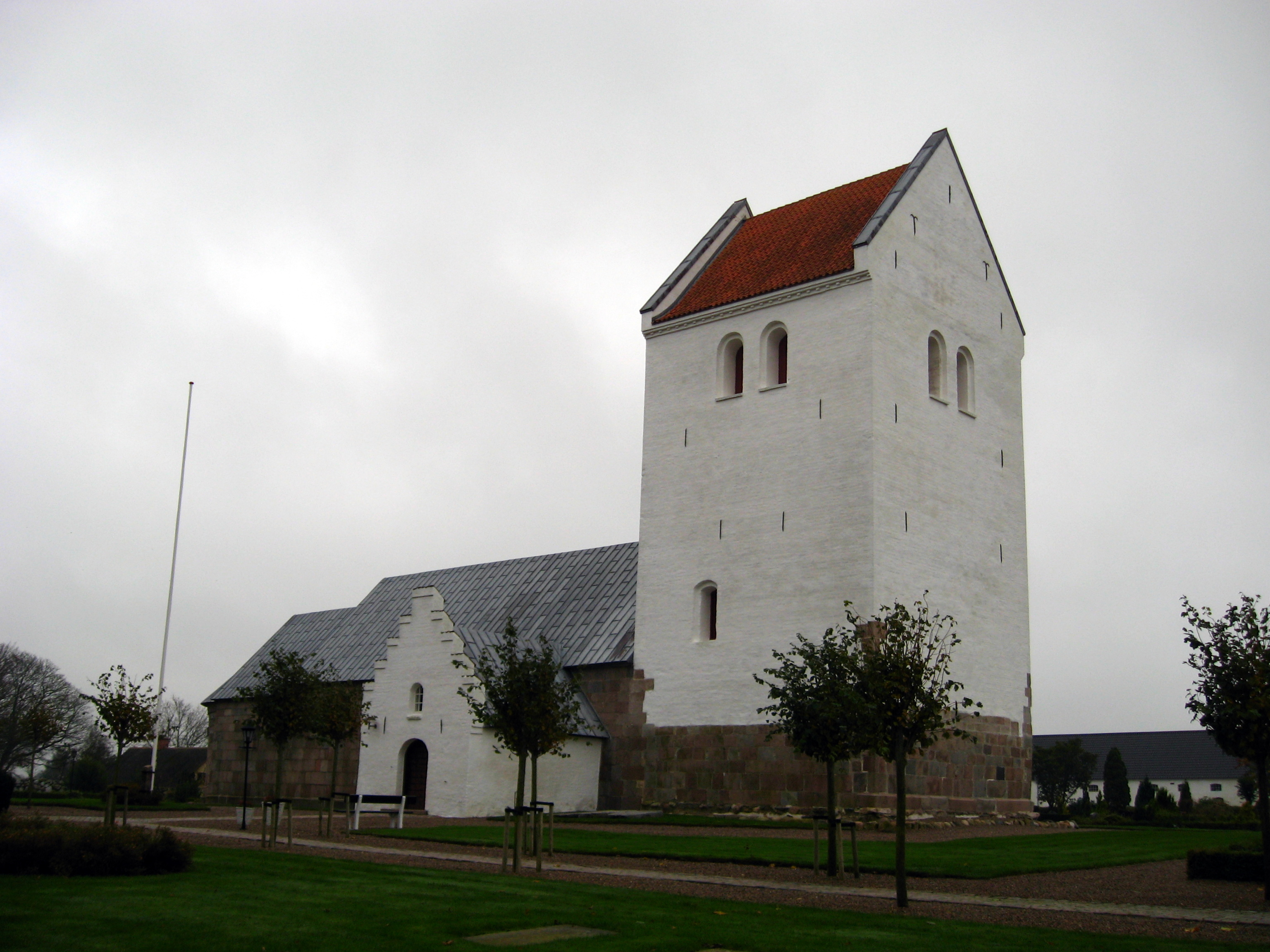 Kettrup Kirke, Jammerbugt Kommune